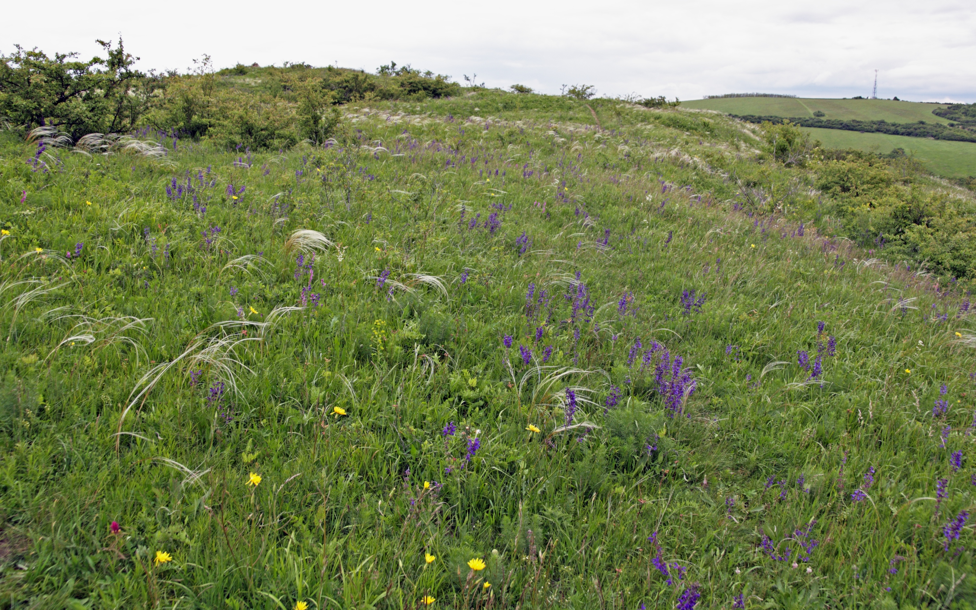 PR Kamenný vrch